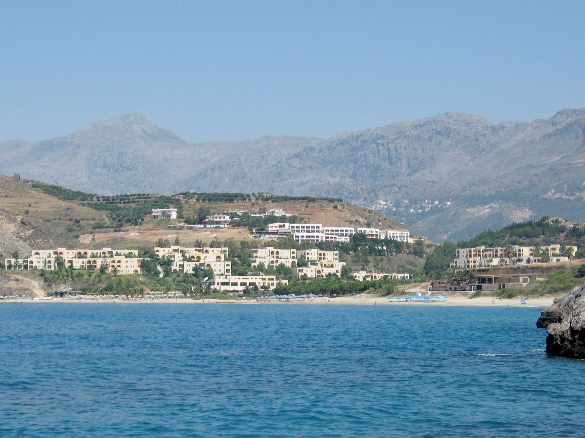 Damnoni bei Plakias, Kreta, Griechenland